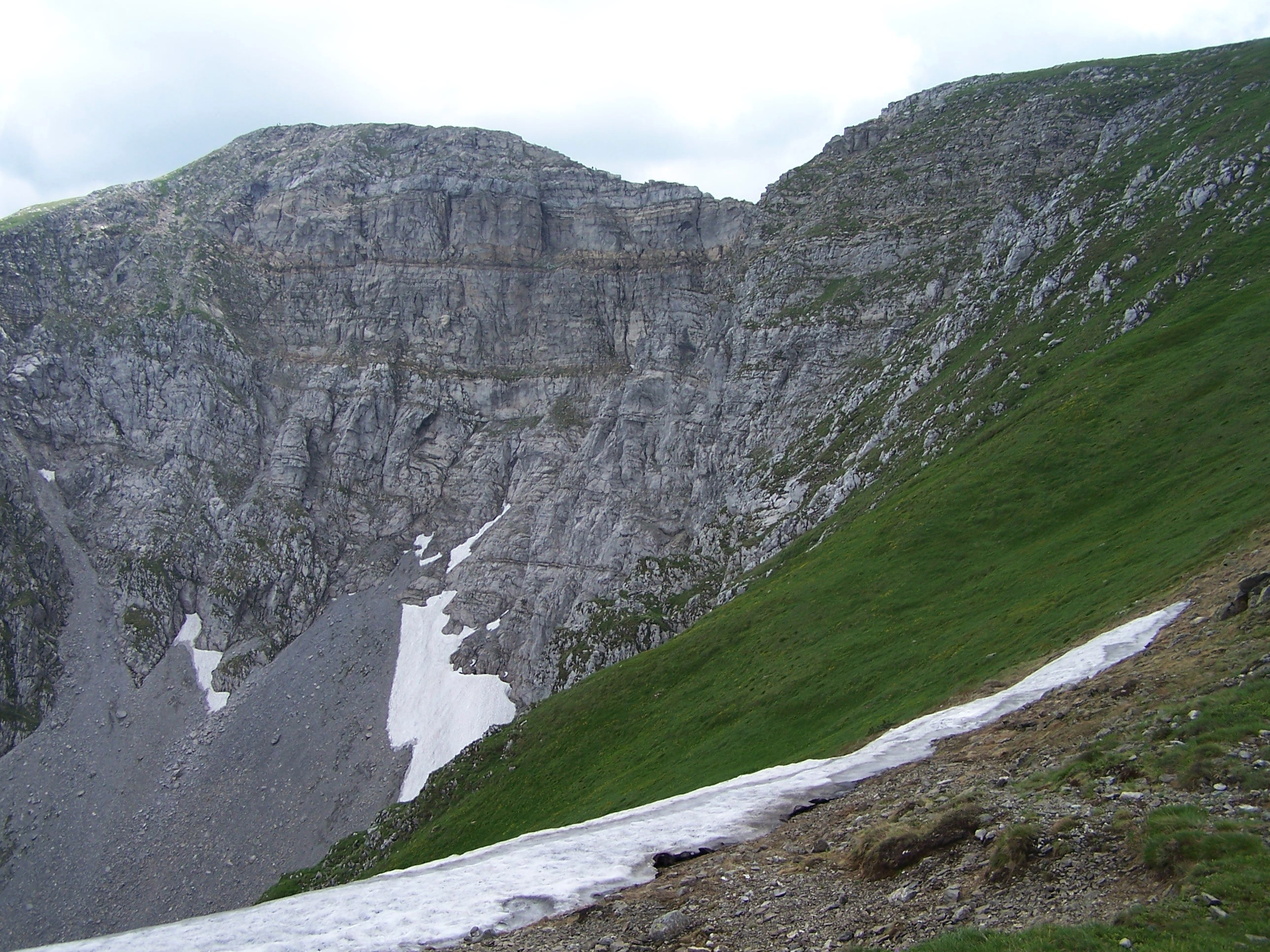 Krzesanica i Mułowa Przełęcz. widok z północnej grani Ciemniaka